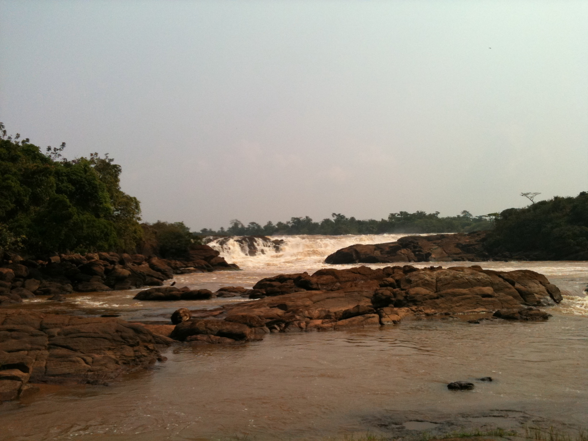 Mayi Munene waterfall